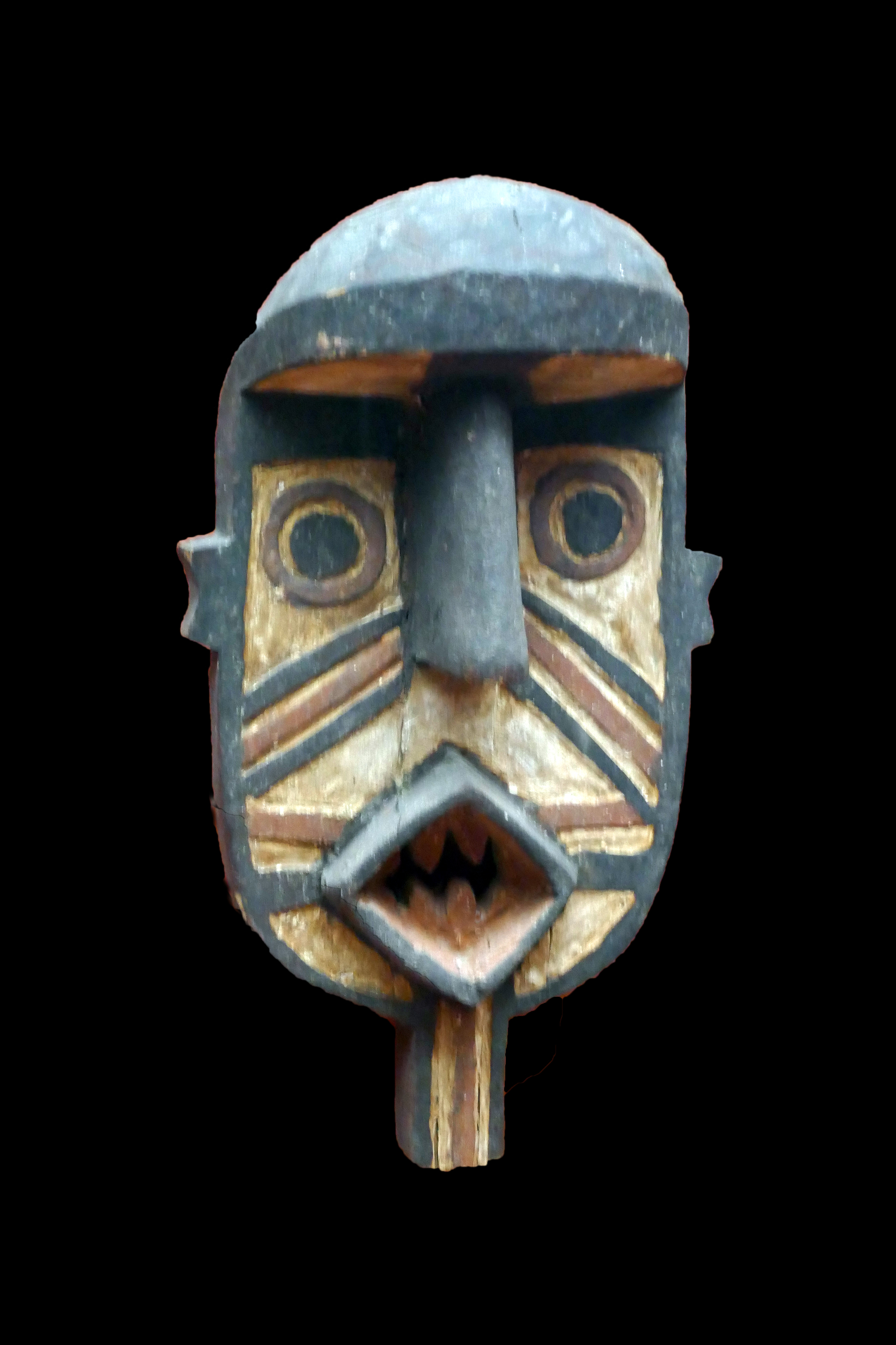 Masque-casque singe. Gurunsi, Burkina Faso, 20e siècle. Musée d'Aquitaine, Bordeaux. Don Gérard Chaumeil, 2004.